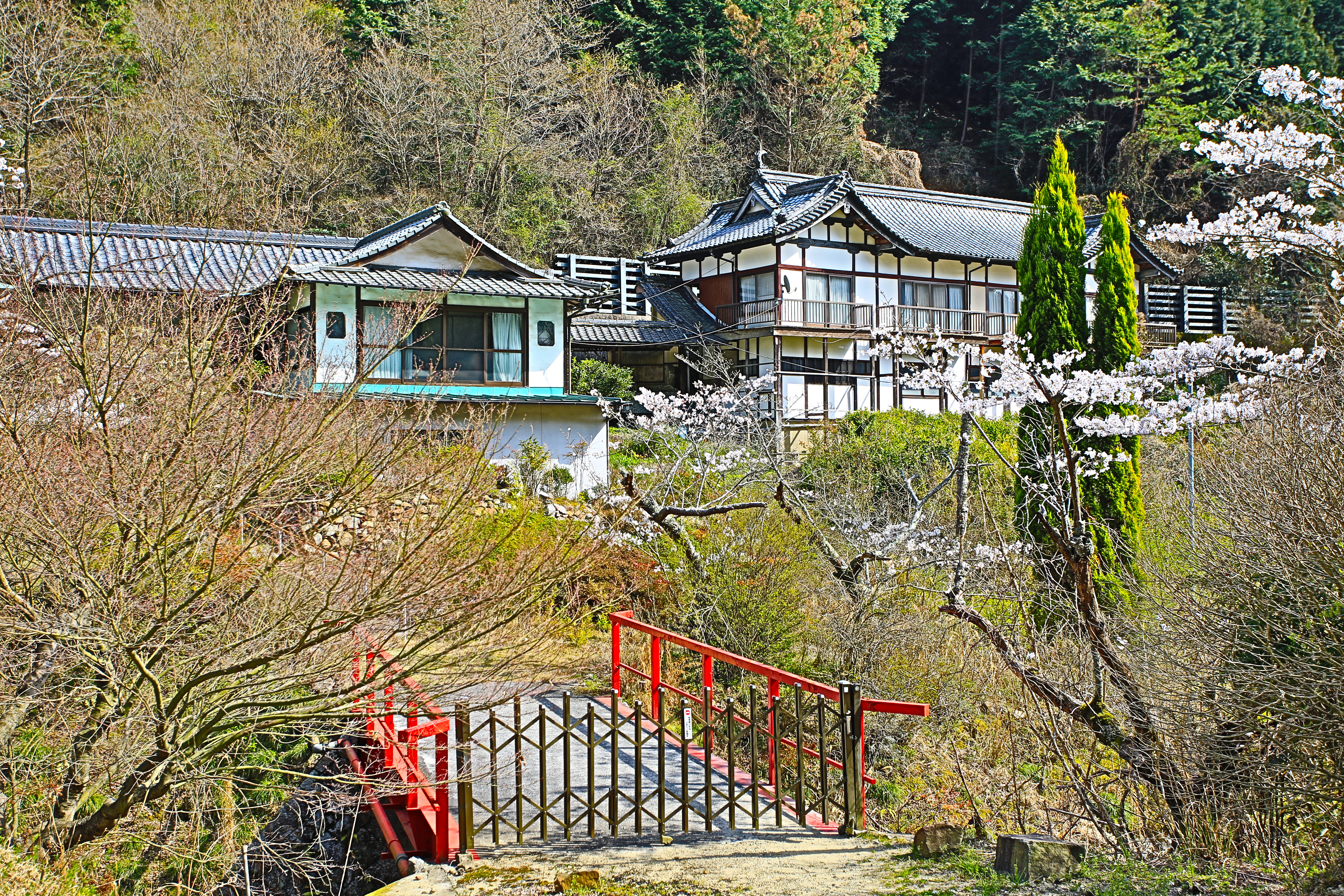 広島県福山市本郷町本郷温泉地区、廃業した旅館。